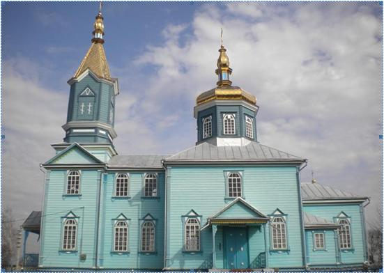 фото, в статті про село Дядьковичі